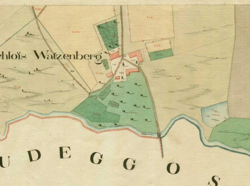 Franciscejski kataster za Kranjsko, 1823-1869